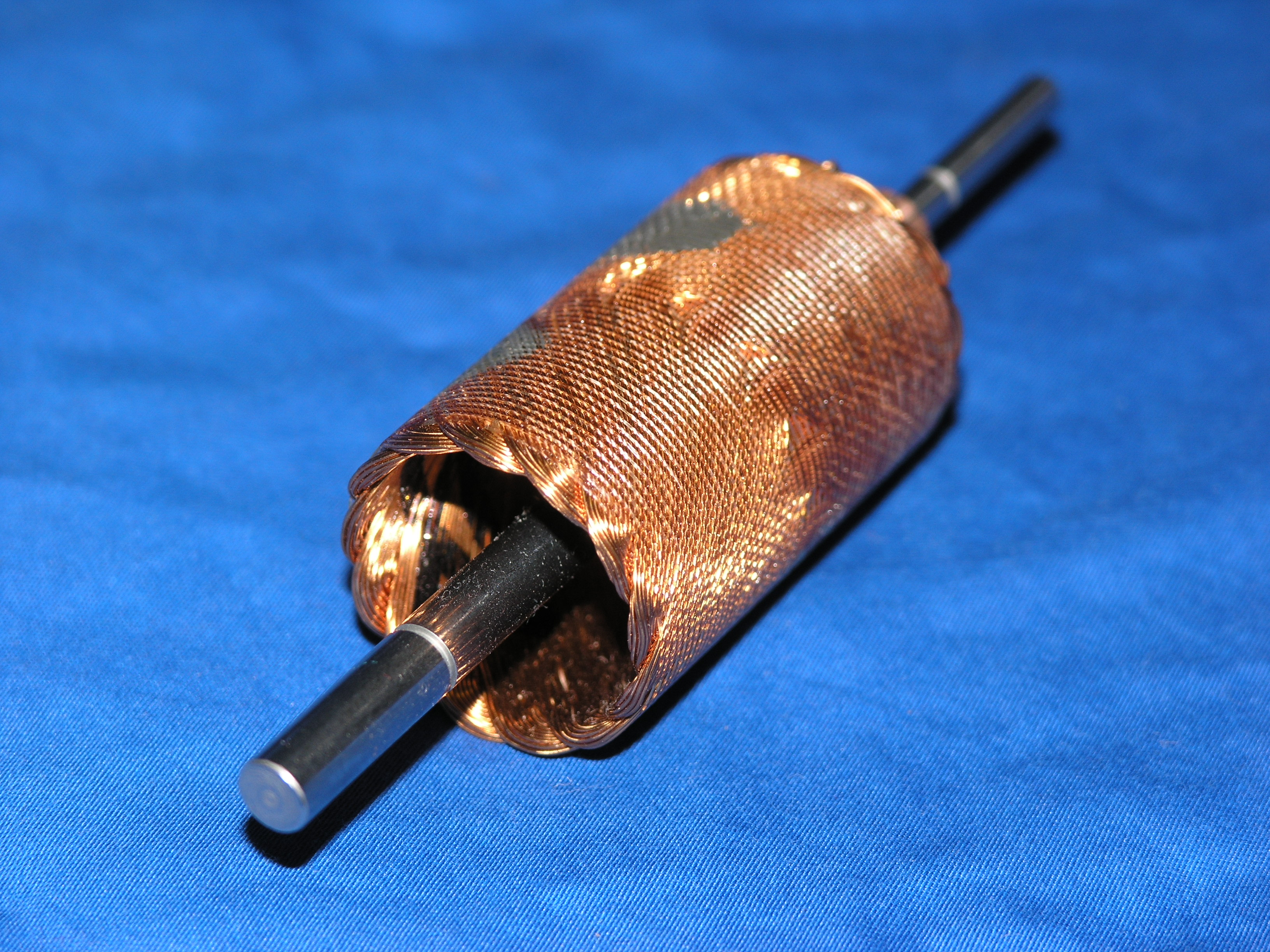 eisenlos gewickelter Rotor einer elektrischen Maschine. Der Permanentmagnet kommt zwischen der Welle und der Kupferwicklung zu liegen.